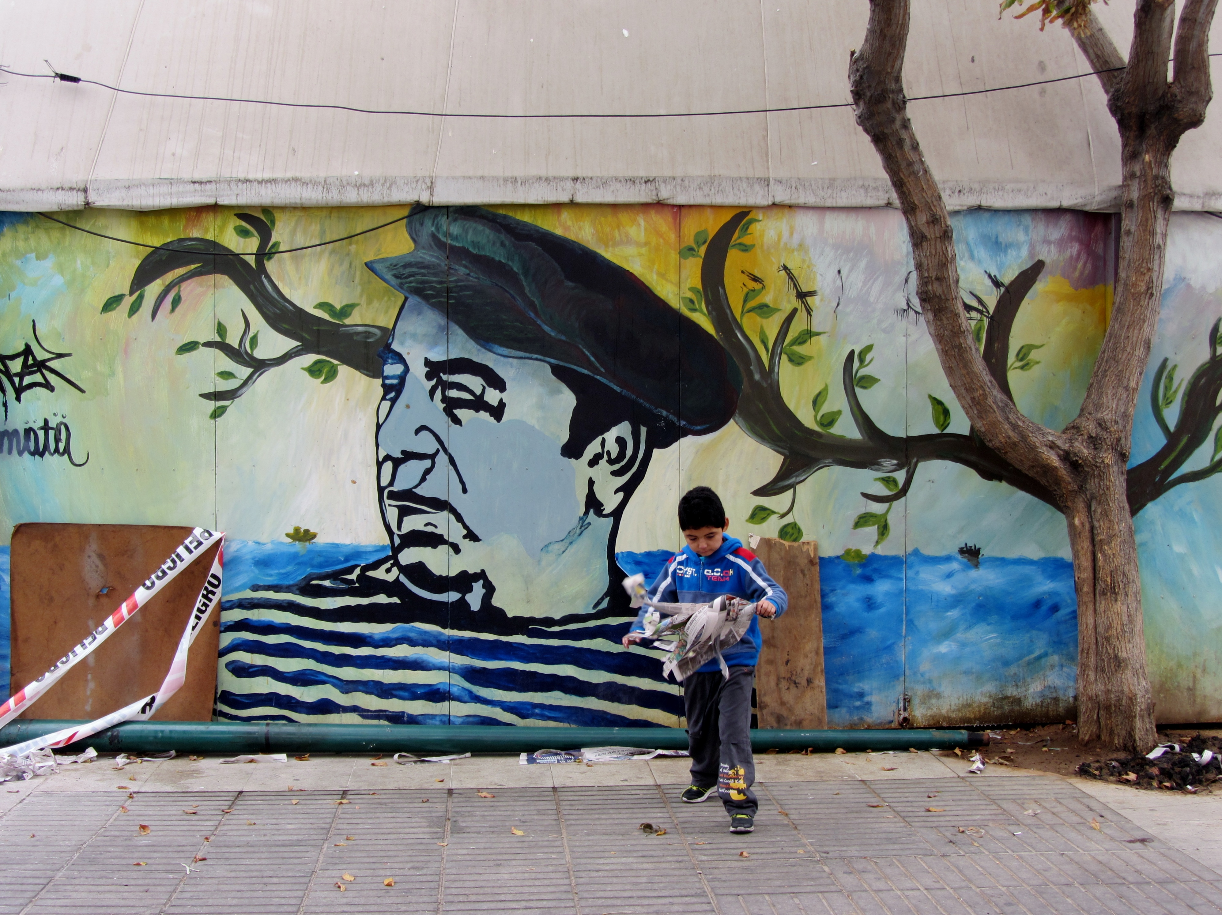 Grafiti con retrato de Pablo Neruda, plaza Lord Cochrane, Valparaíso